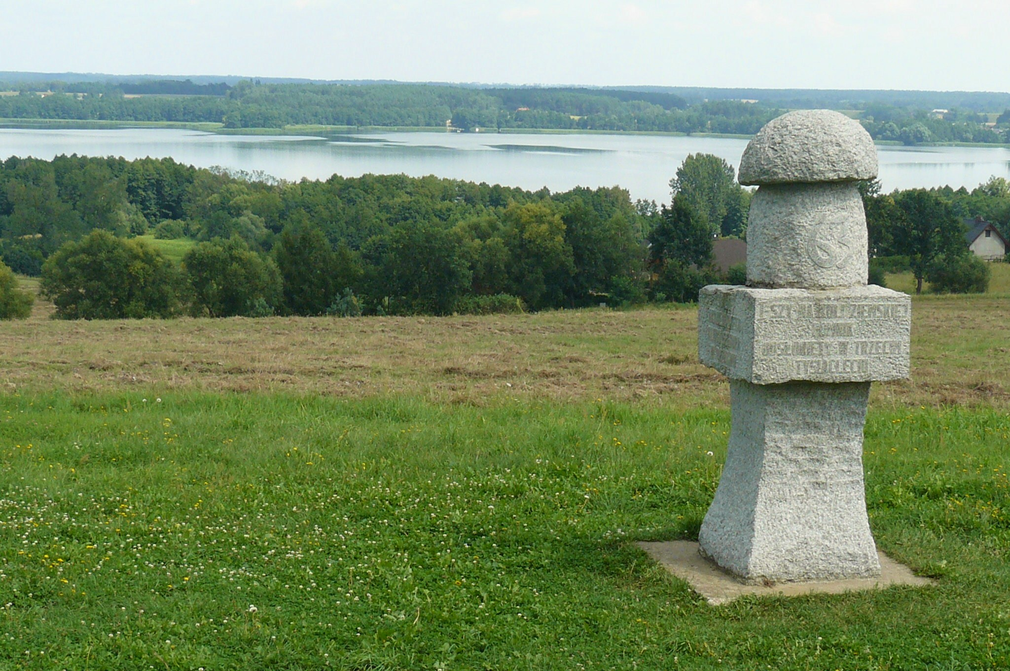 Pomnik w Łężeczkach, na punkcie widokowym.